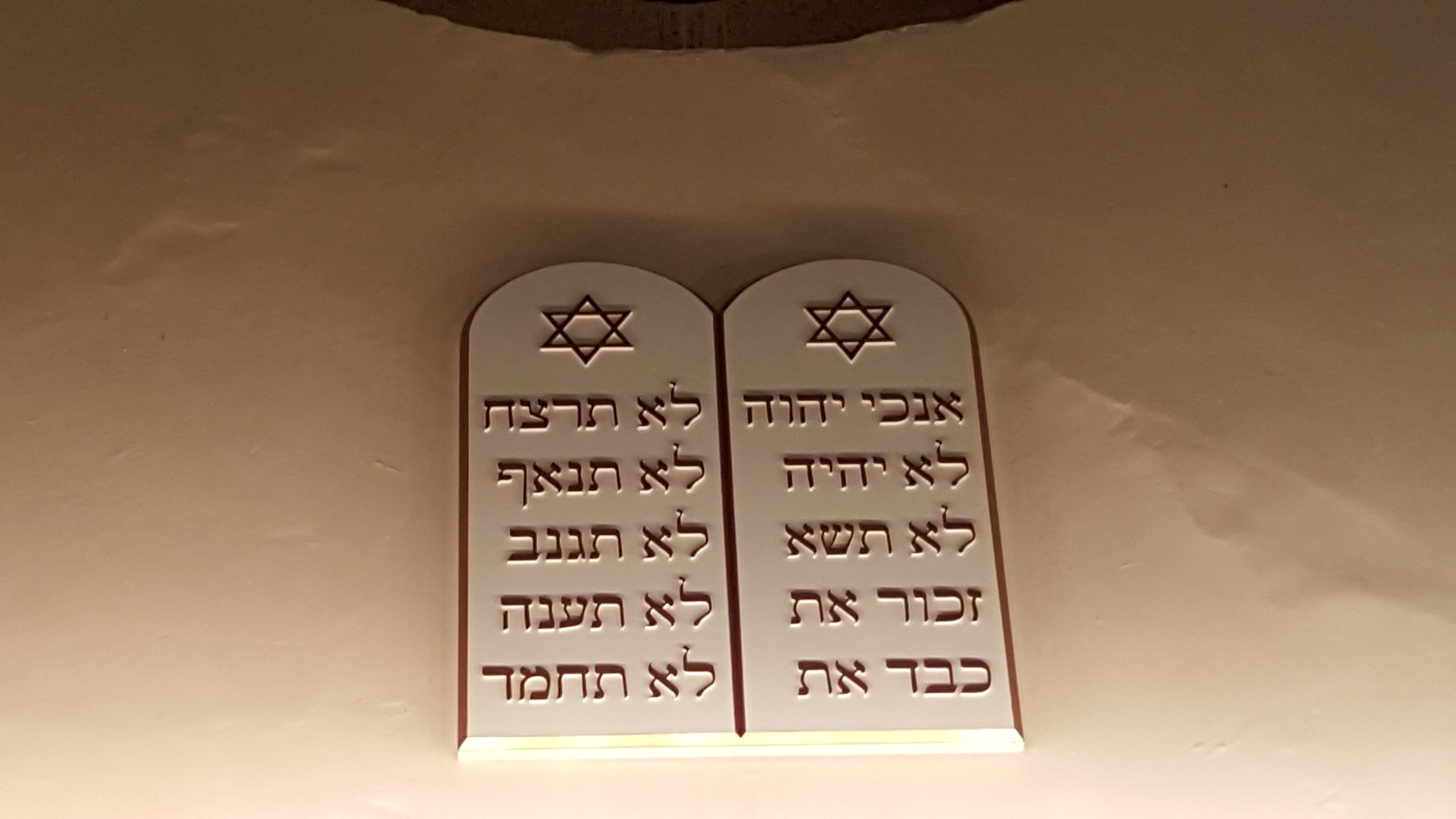 Les tables de la Loi "Décalogue" ont été remplacées.